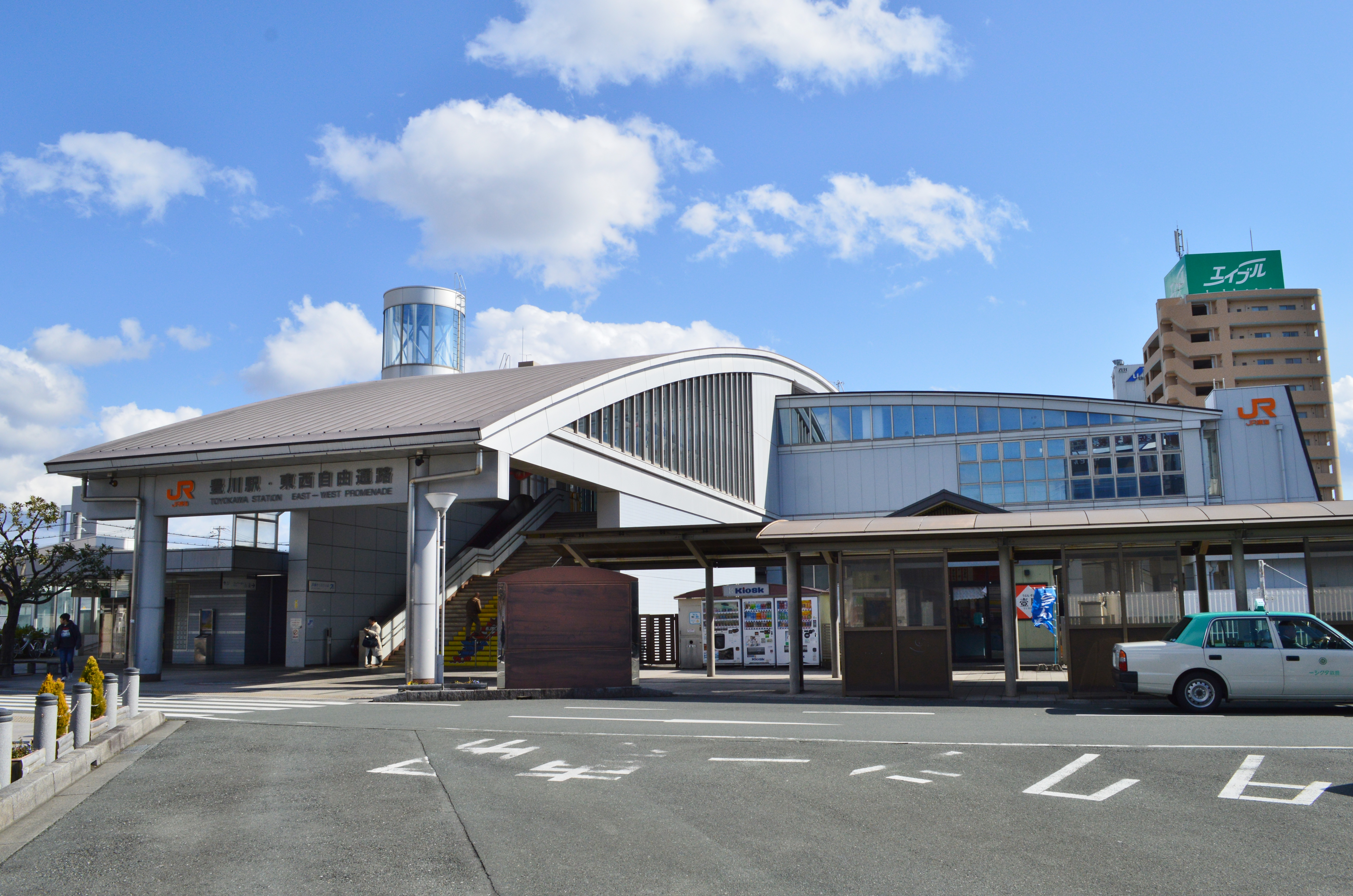 豊川駅 (愛知県) 駅舎